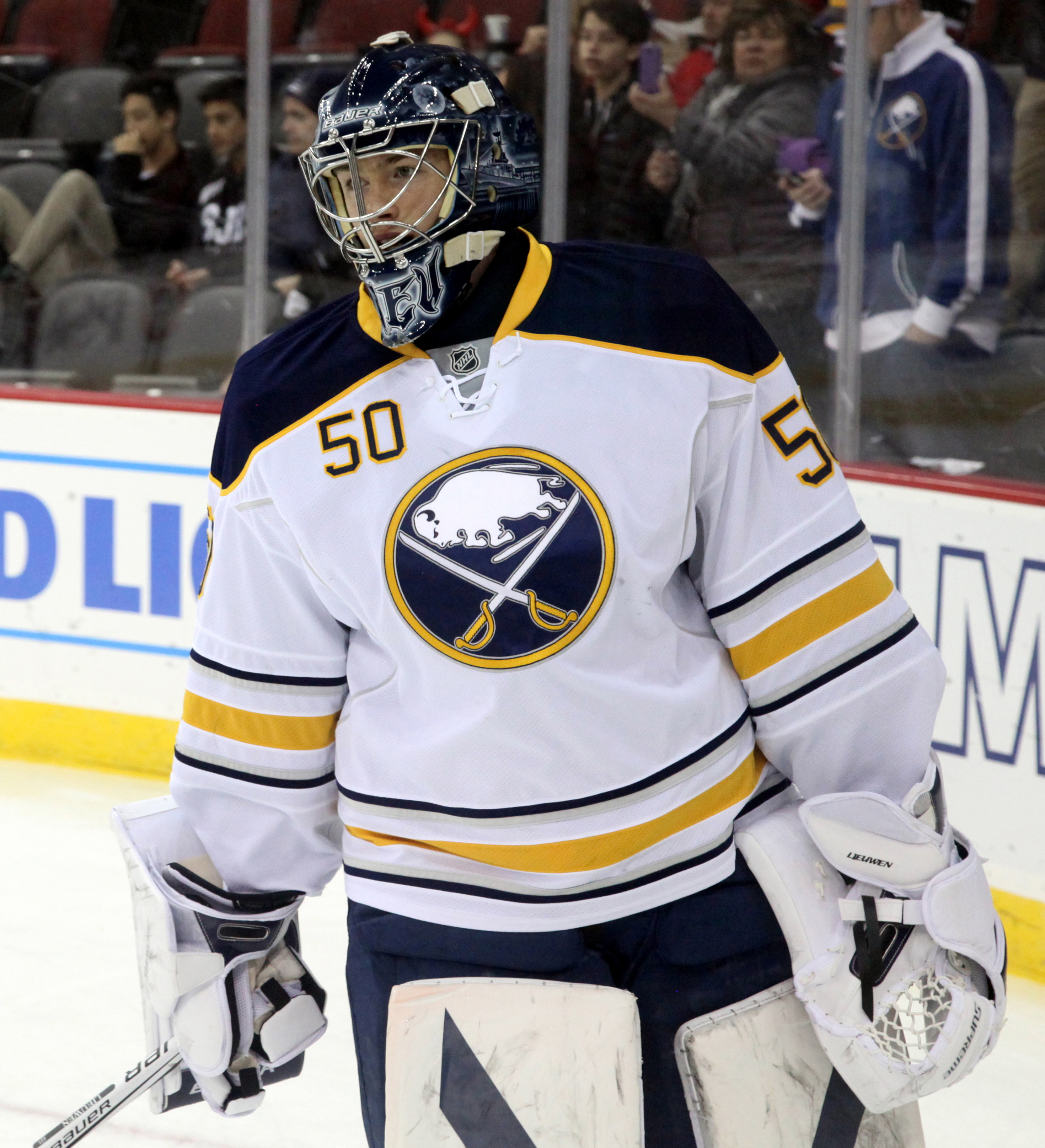 Nathan Lieuwen in April 2016.